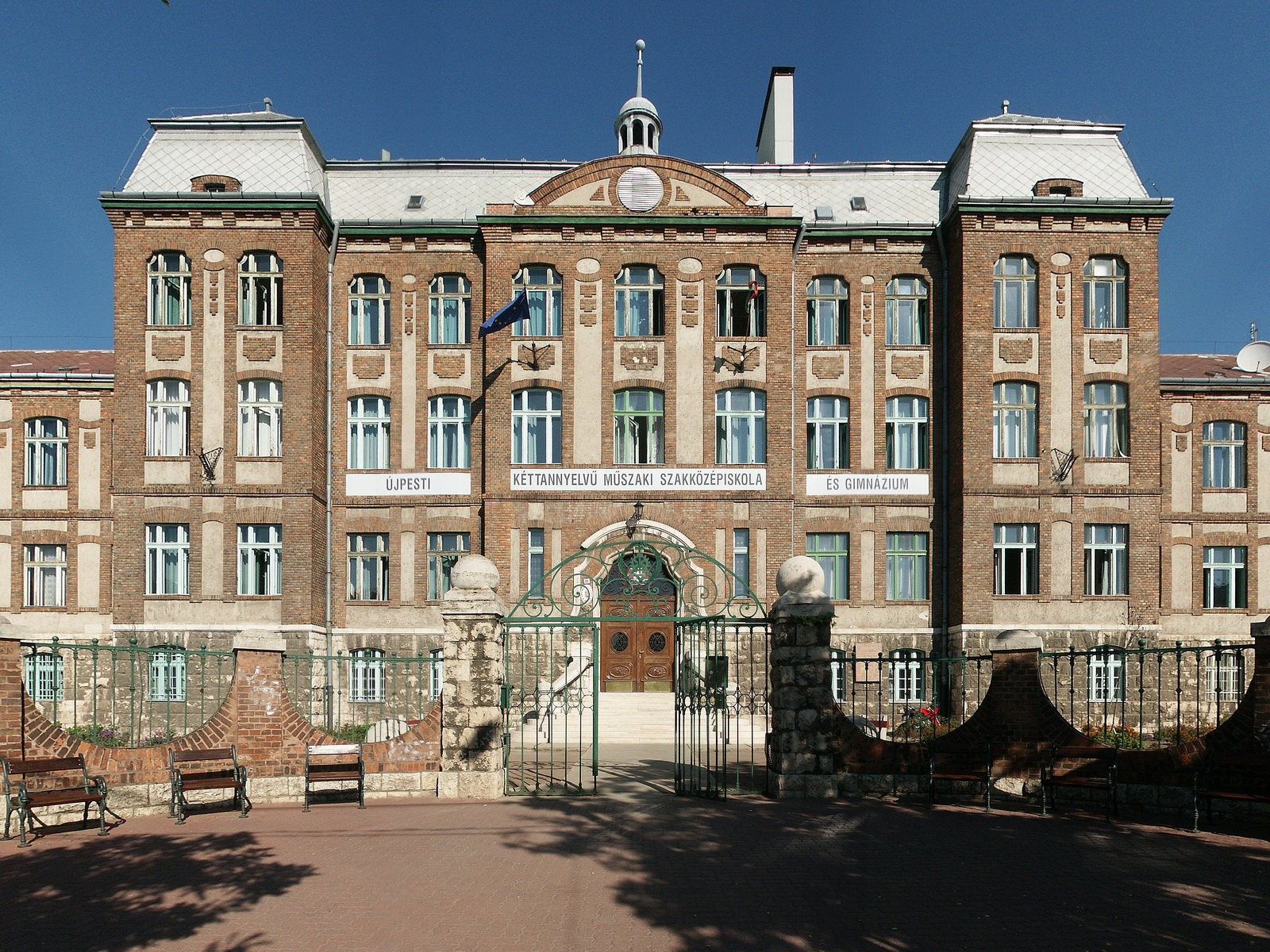 Az Újpesti Két Tanítási Nyelvű Műszaki Szakközépiskola és Gimnázium épülete. Épült Foerk Ernő tervei szerint 1927-ben. Cím: Görgey Artúr út 26. This is a photo of a monument in Hungary, Identifier: 7899